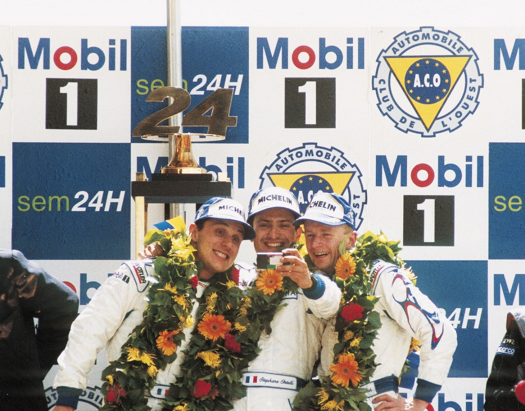 24 Heures du Mans 1998, dimanche 7 juin 1998, 16h20. Les trois vainqueurs (de g. à d.), Laurent Aiello, Stéphane Ortelli et Allan McNish, font leur dernier selfie avant de rendre leurs appareils à François Granet qui va publier le reportage dans L'Automobile Magazine.